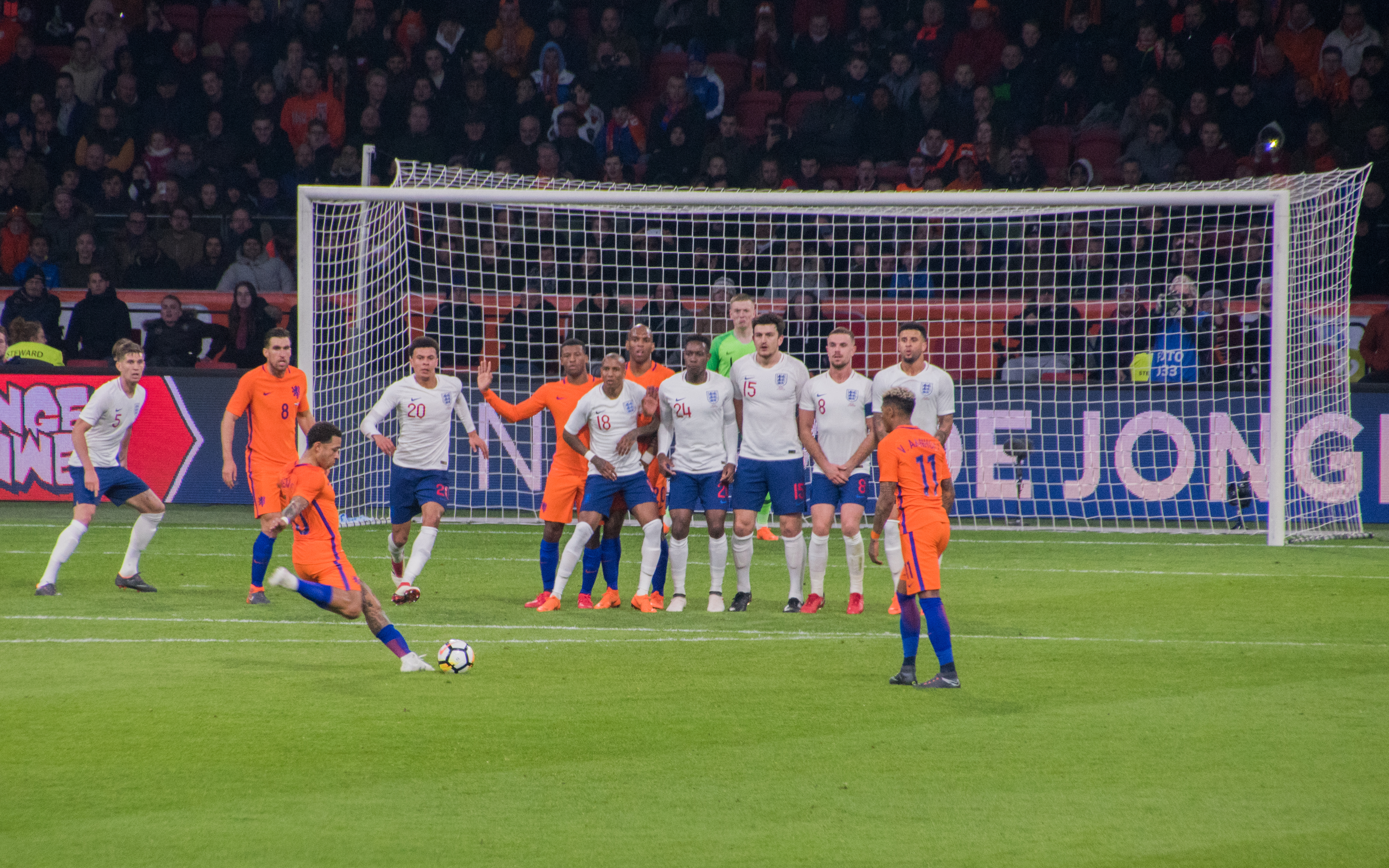 _DSC0305-2